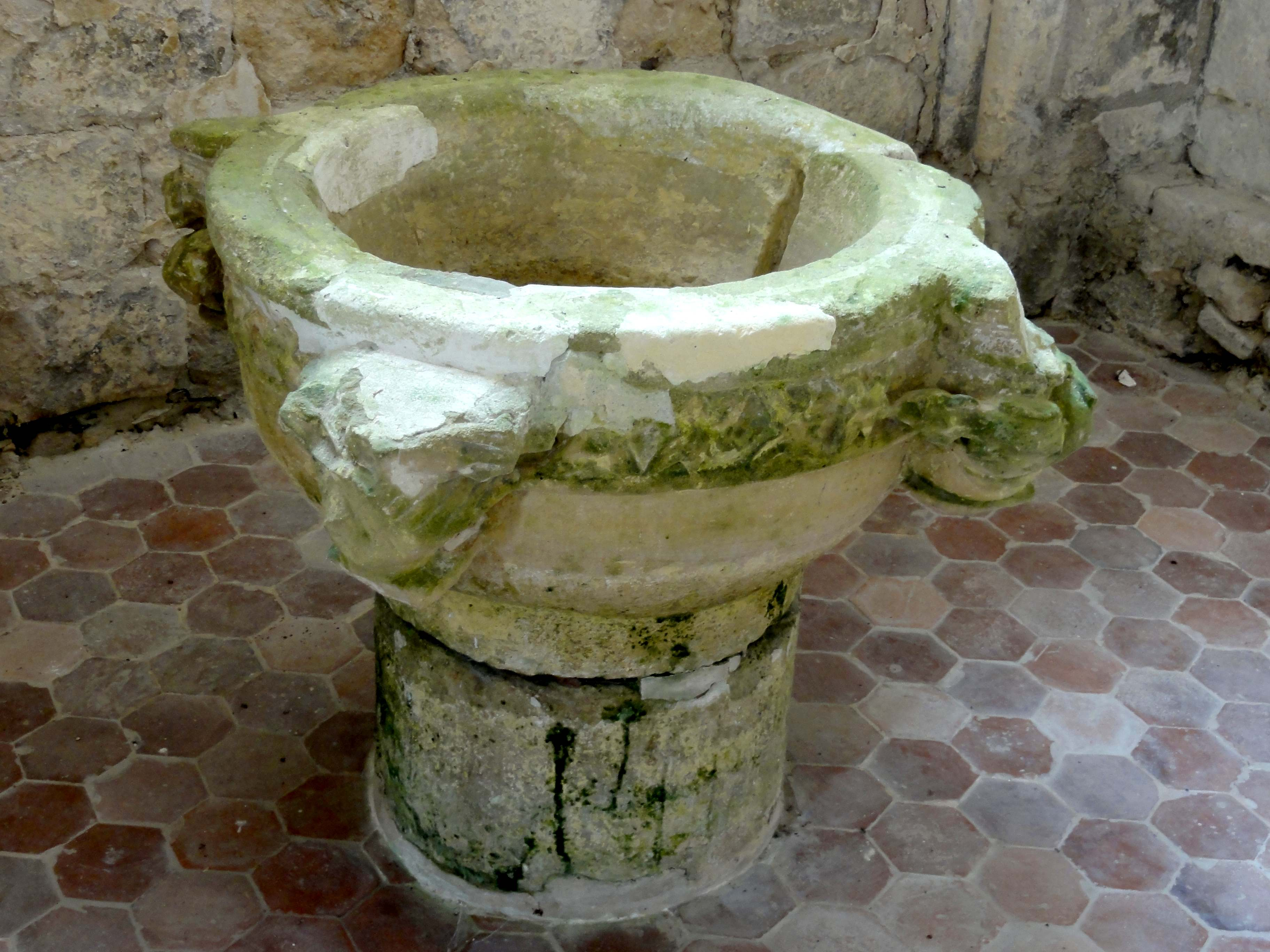 Fonts baptismaux du XIIIe siècle.